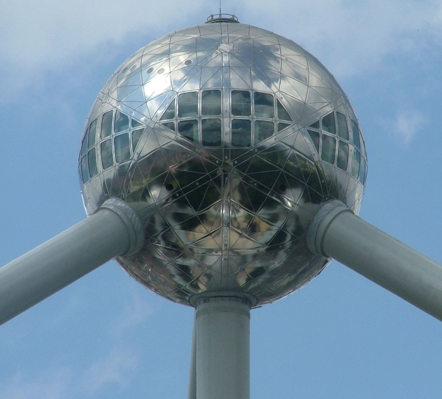 Belgium, Bruxelles - Brussel, Pl: Belgia, Bruksela